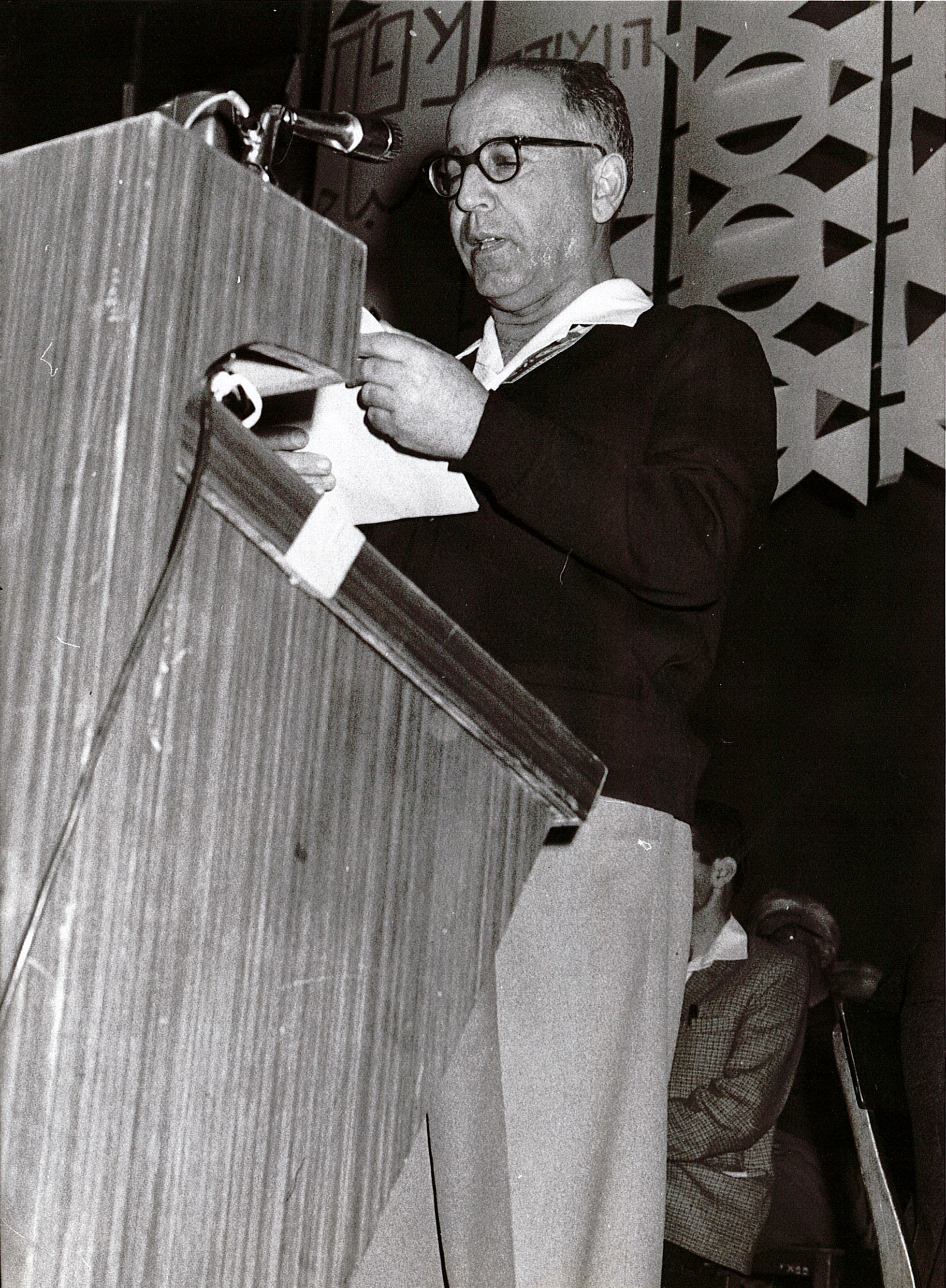 פרץ מרחב נואם בשנות השבעים